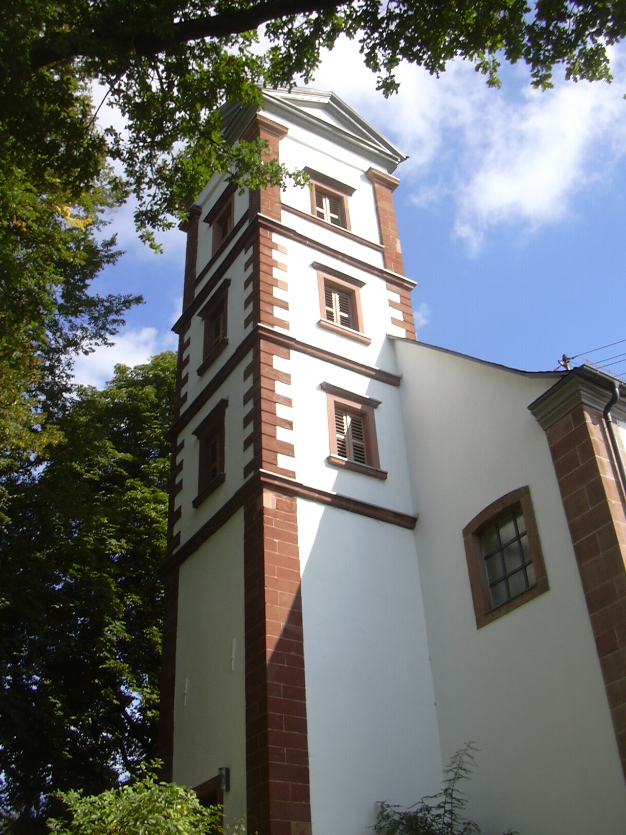 Niederlinxweiler, Protestant Church, Saarland/Germany